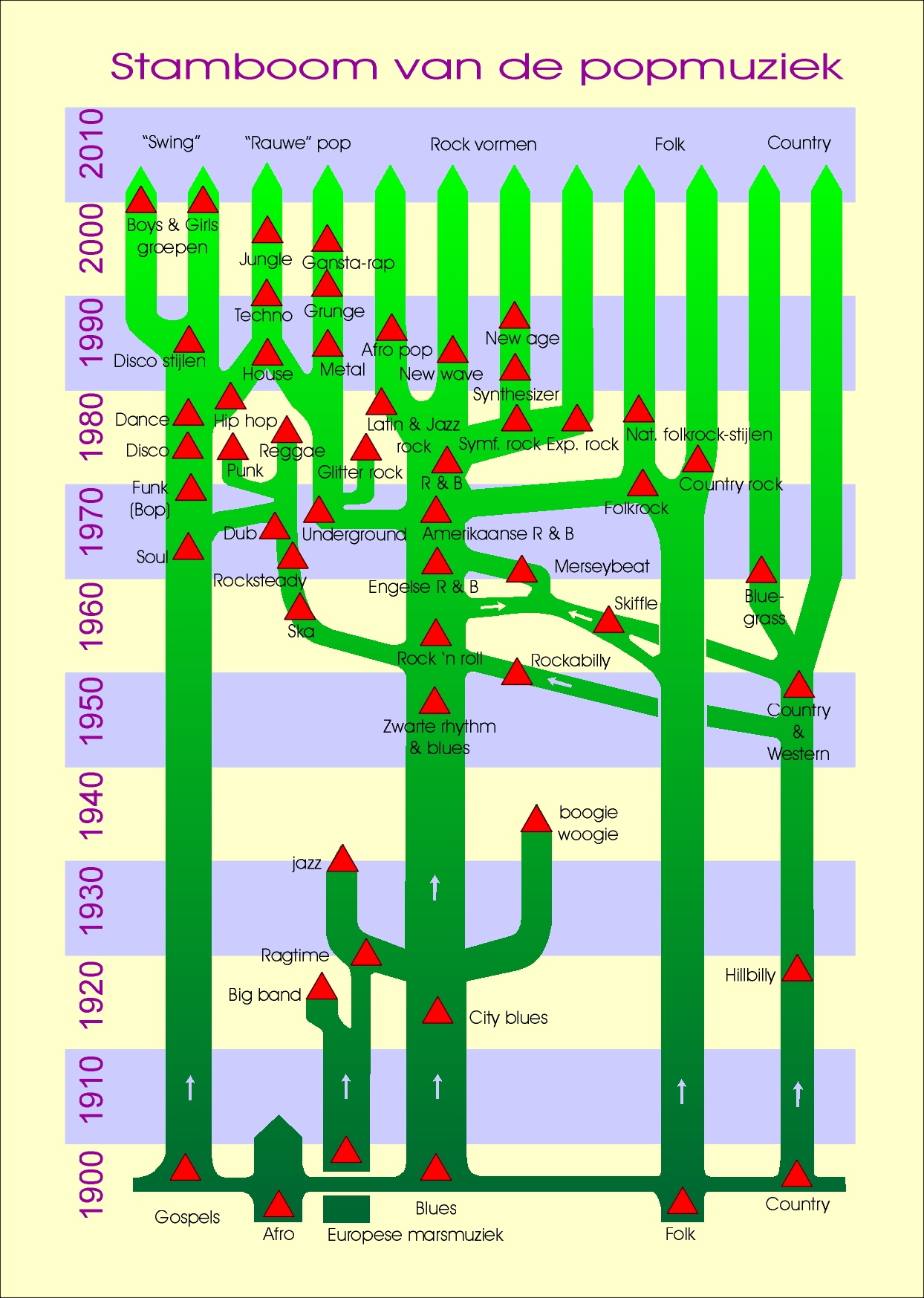 Stamboom van de (westerse) popmuziek